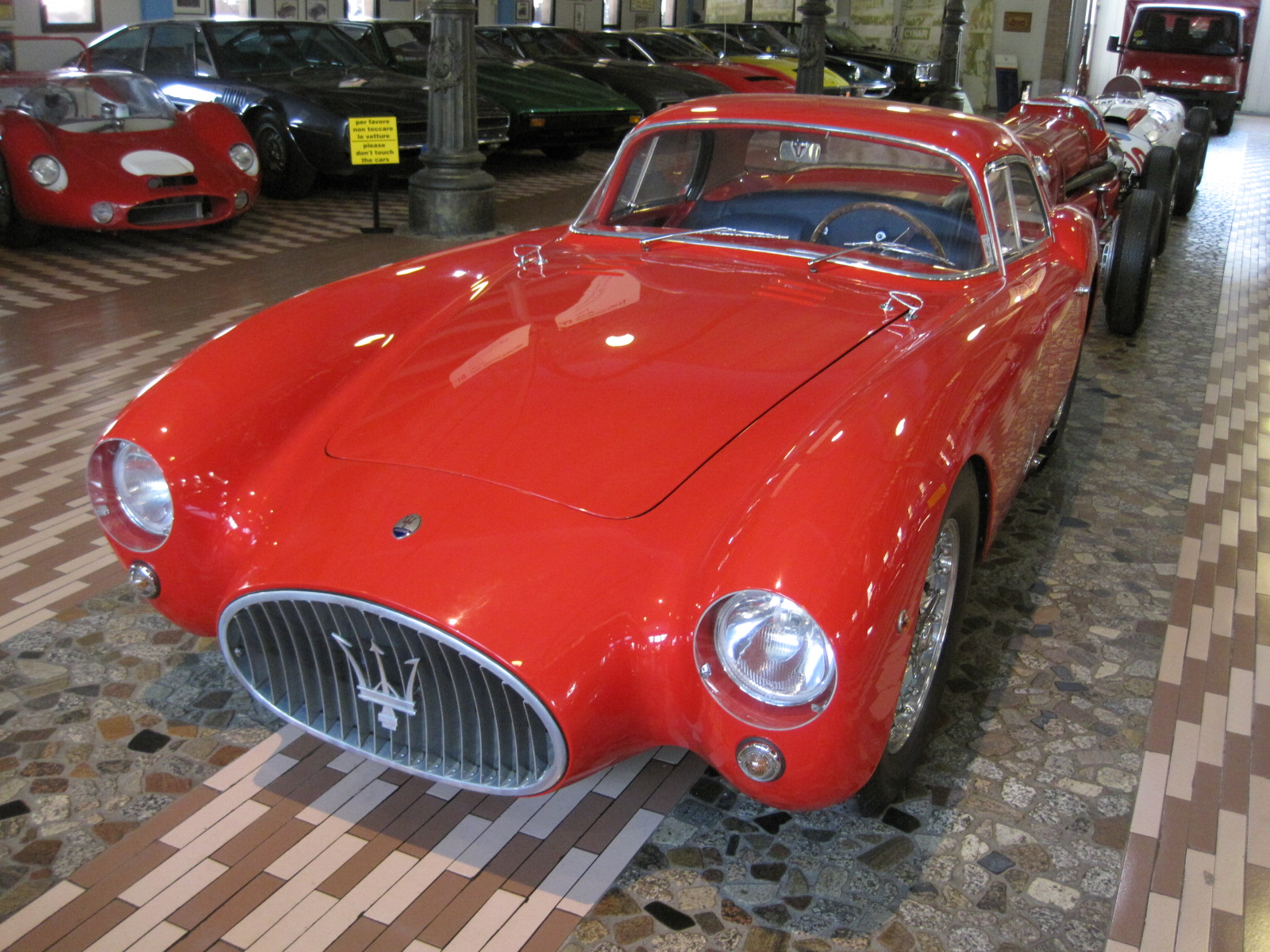 Automobiles in Panini Maserati Museum in Modène, Maserati A6GCS Berlinetta Pininfarina